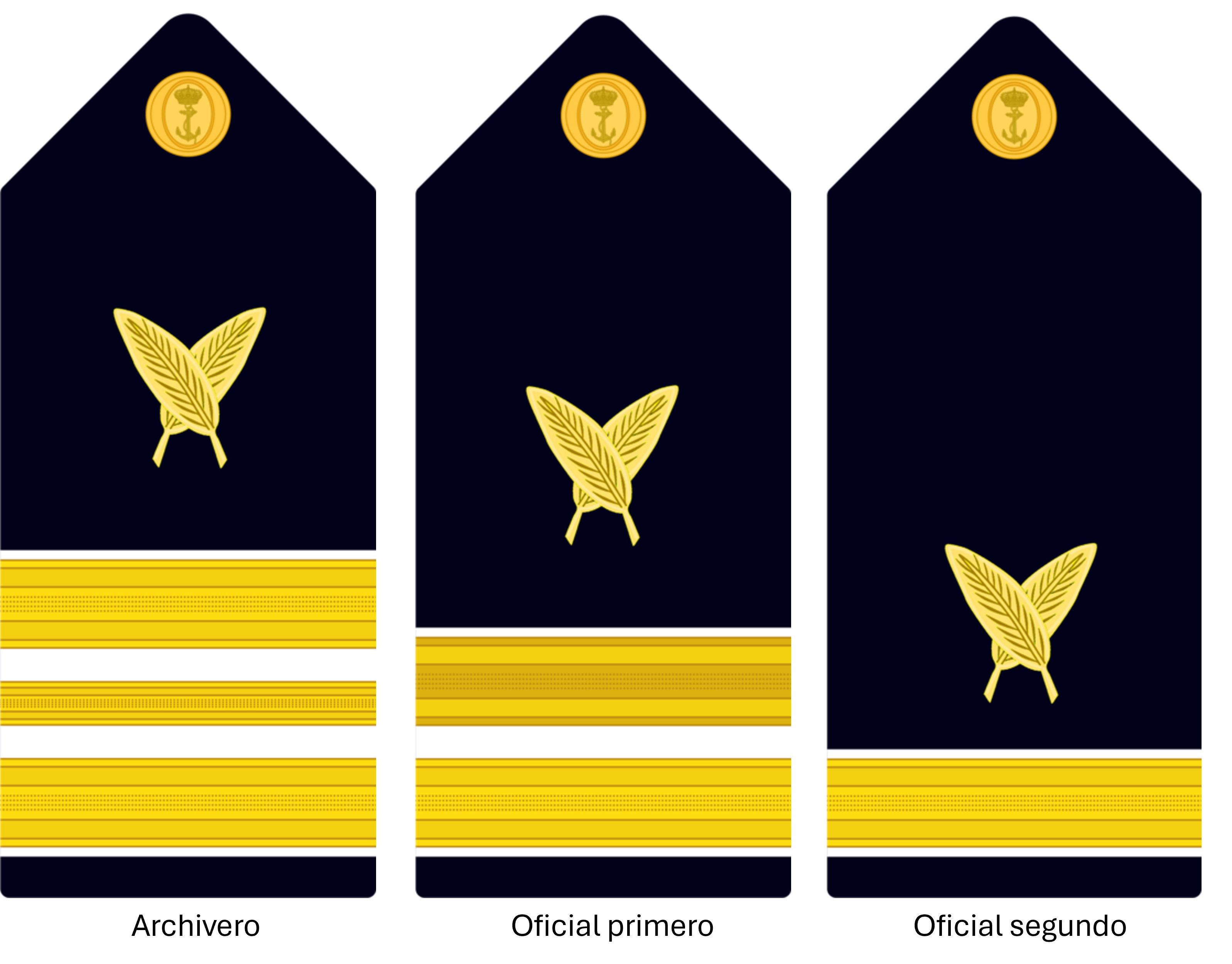 Palas del Cuerpo de Oficinas de la Armada española (extinguido)